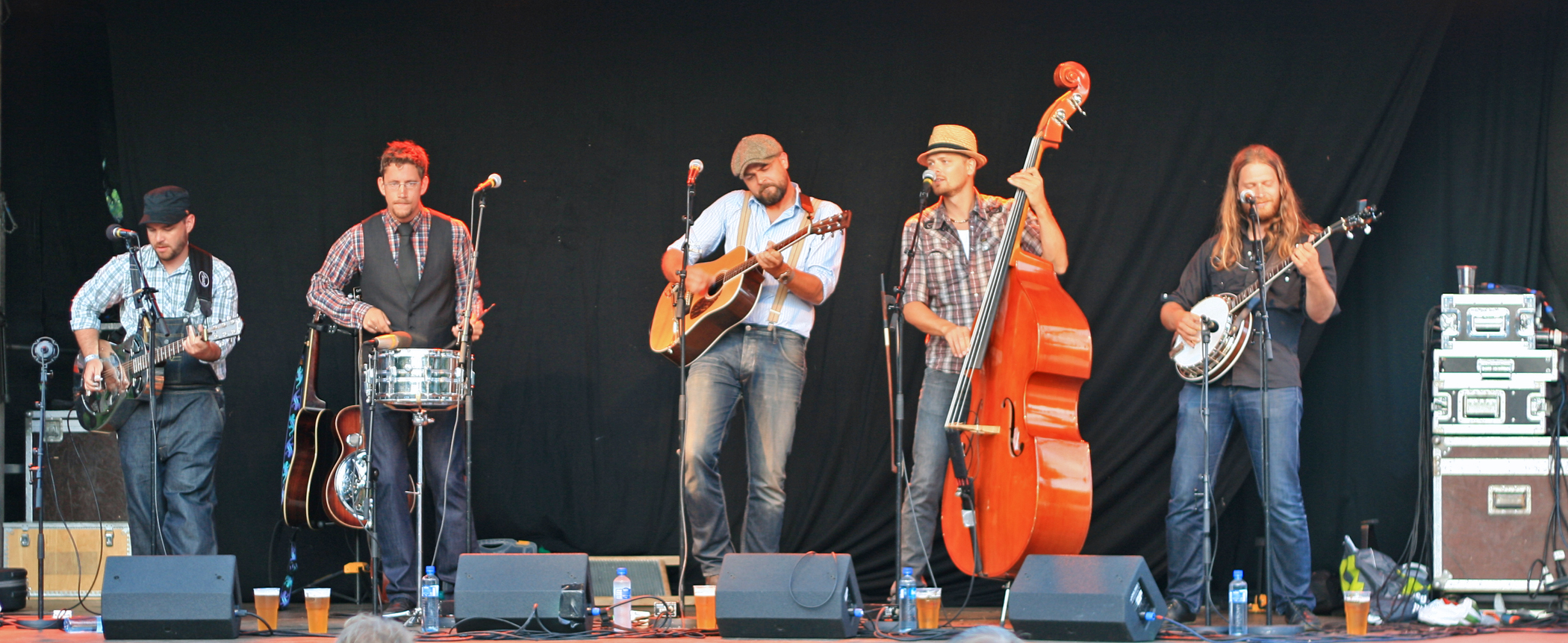 Ila Auto spiller i Ula, Larvik, 18.7.2008